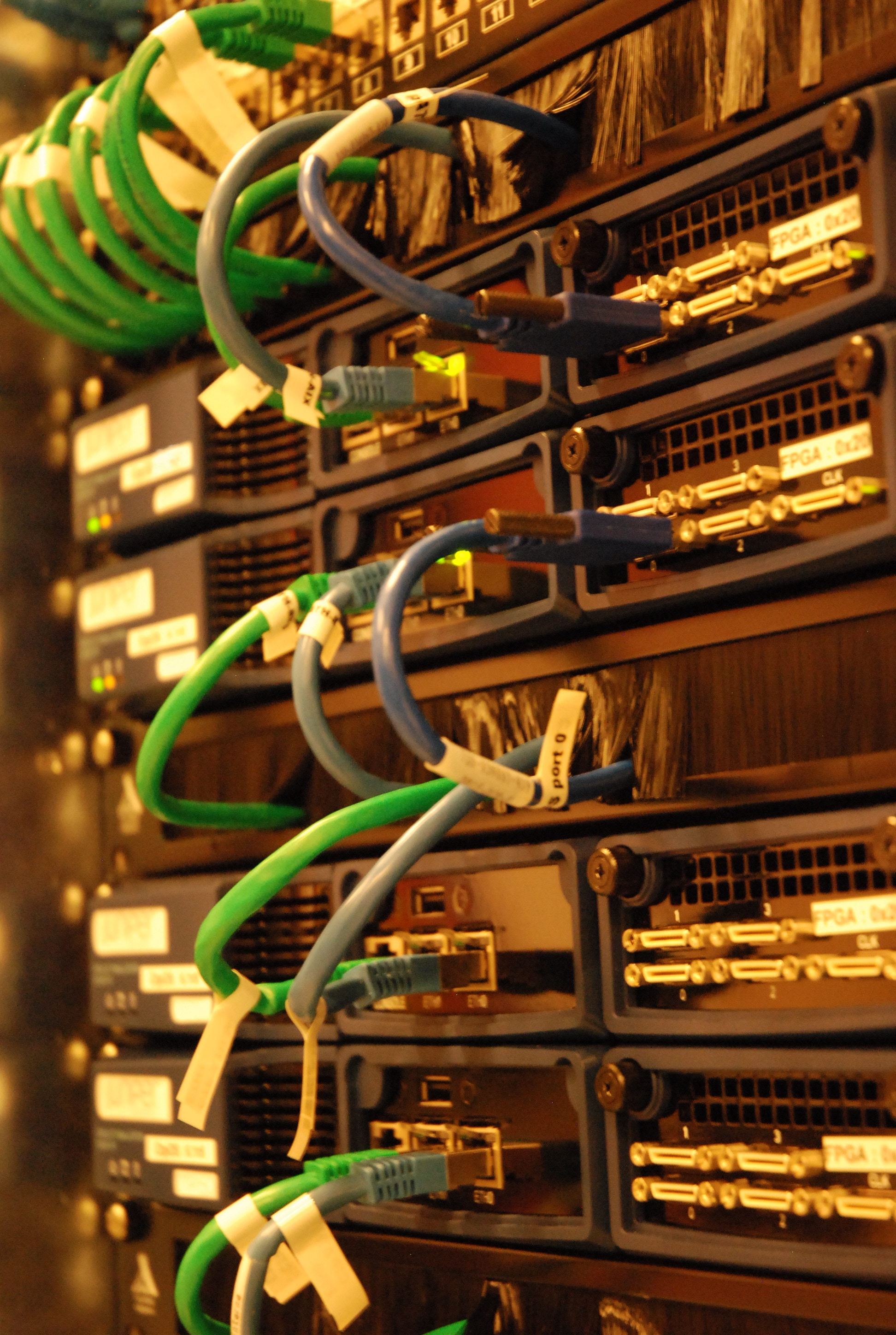 Détail du réseau ORTOLAN au Centre Régional de Contrôle en Route Nord